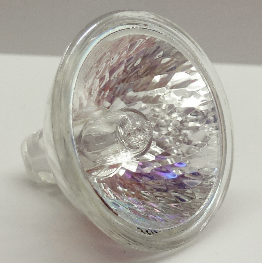 Eine 12 Volt Halogenlampe mit 35 Watt.